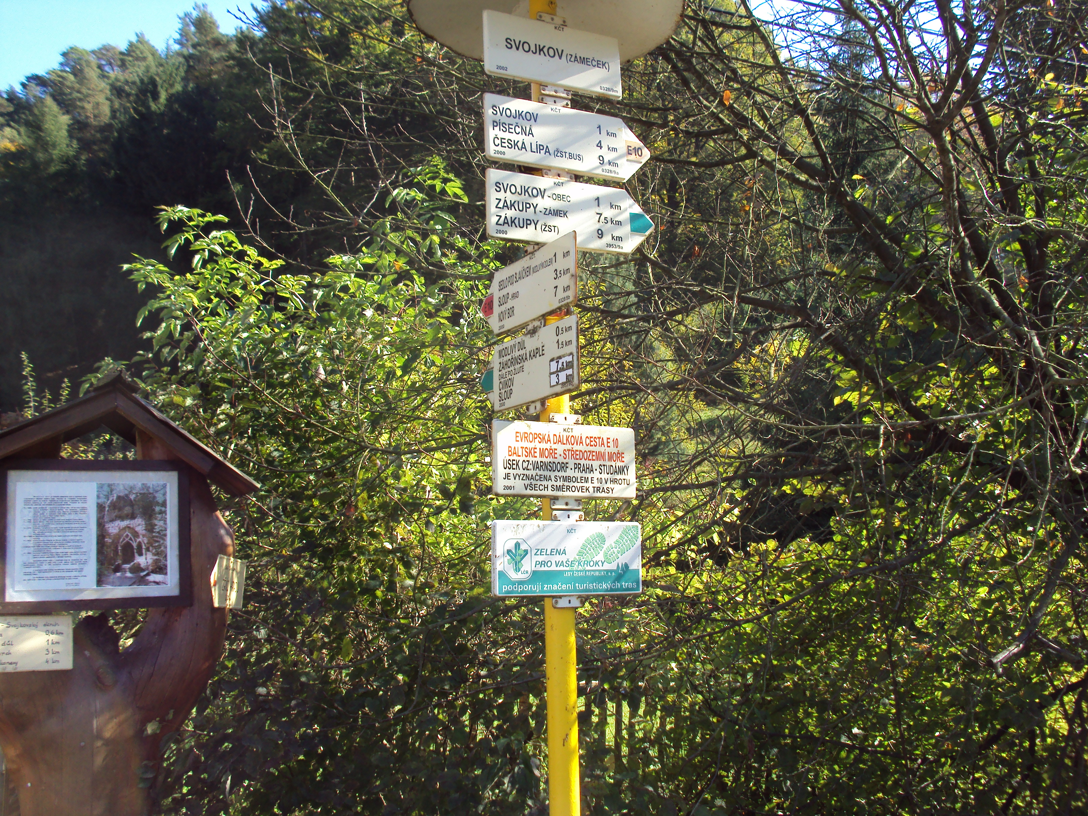 Rozcestník v centru Svojkova